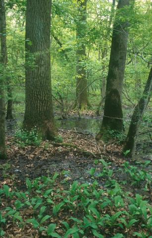 Gyöngyvirágos tölgyes, Baktalórántházi Erdő Természetvédelmi Terület